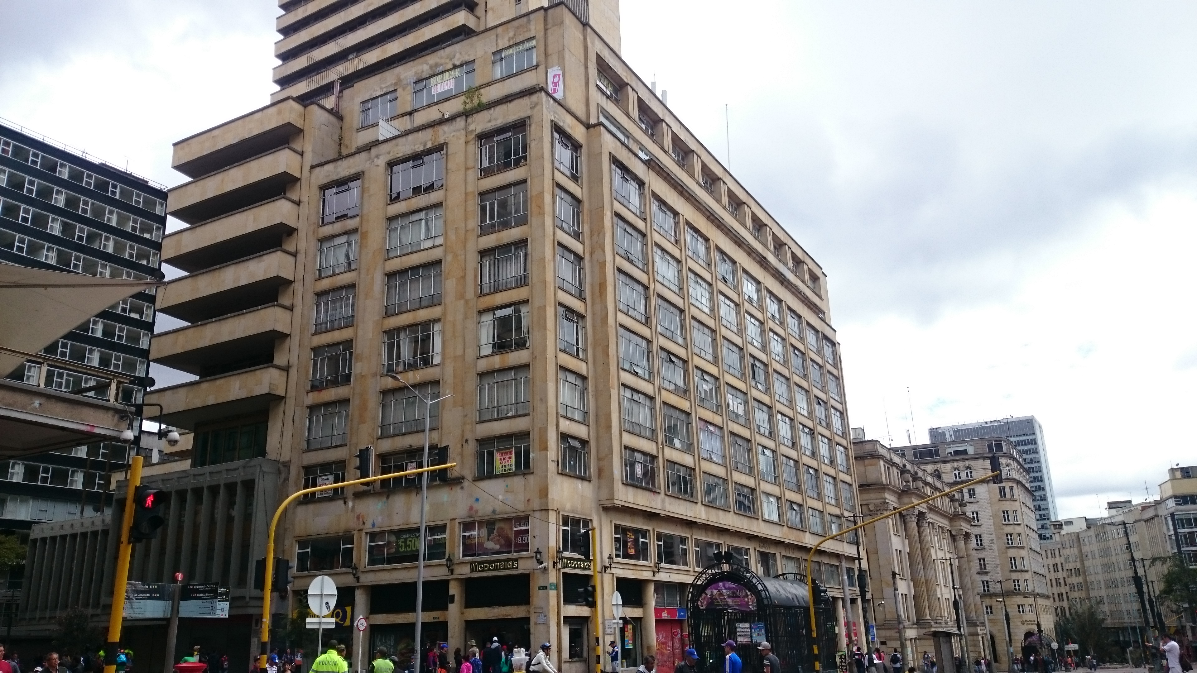 Edificios Henry Faux y Pedro A. López